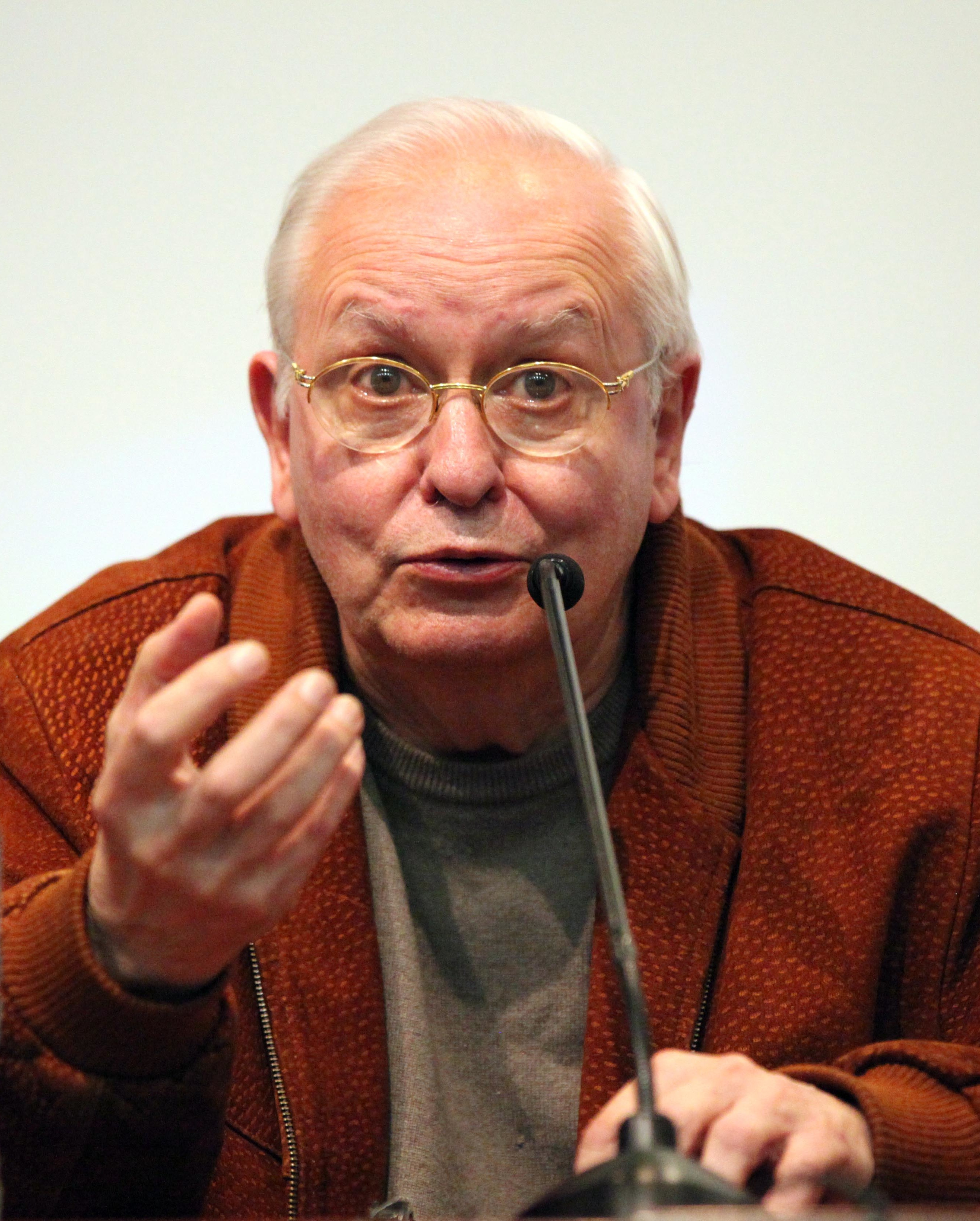 Quito (Ecuador), 16 de mayo del 2012.- Presentación del Documental CATASTROIKA y Presentación de la Revista Debates y Combates. Interviene el Profesor Ernesto Laclau. Foto: Xavier Granja Cedeño/Ministerio de Relaciones Exteriores, Comercio e Integración.